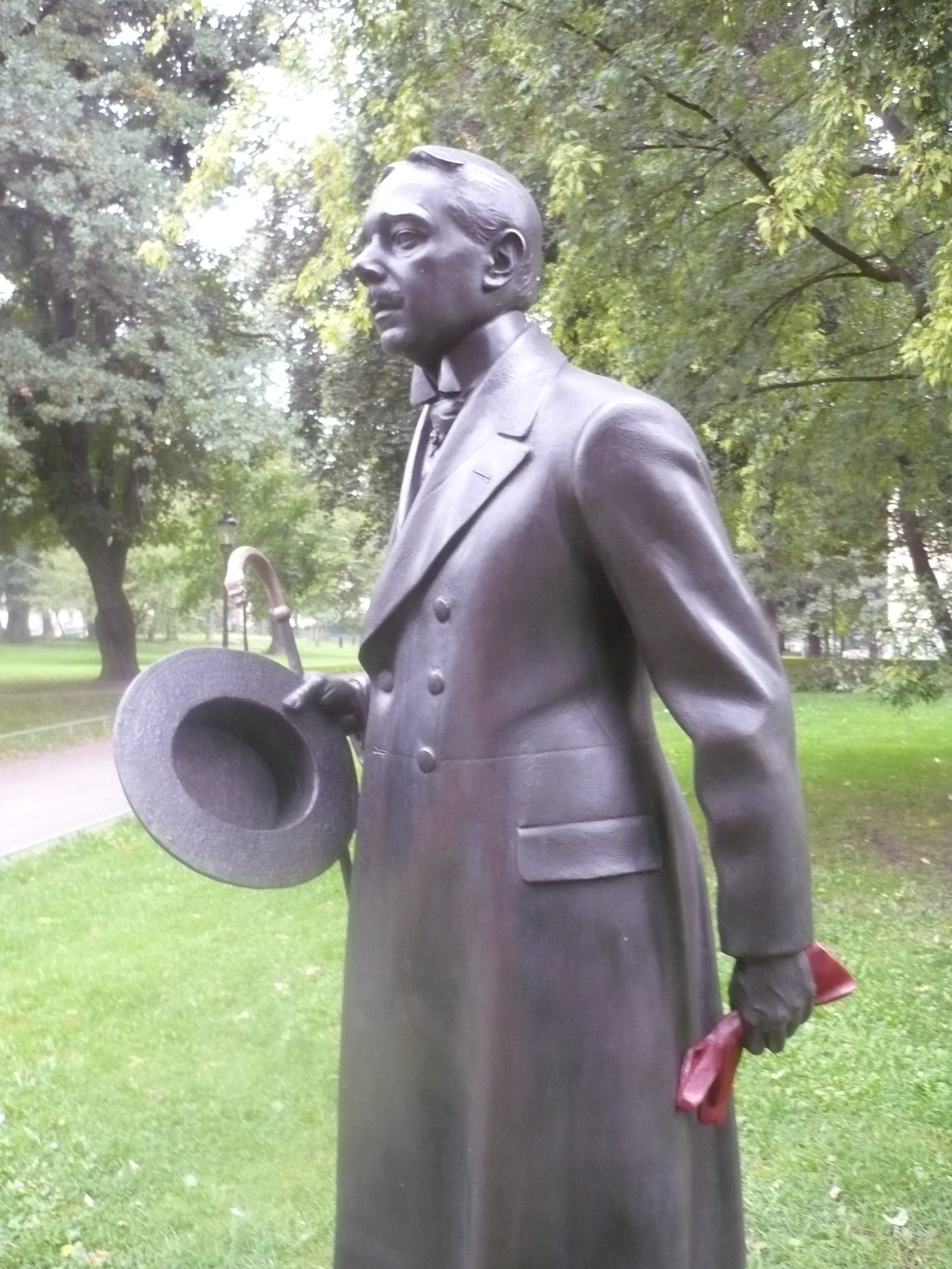 Staty av Hjalmar Söderberg. Avtäckt den 9 september 2010 i Humlegården utanför Kungl. biblioteket.